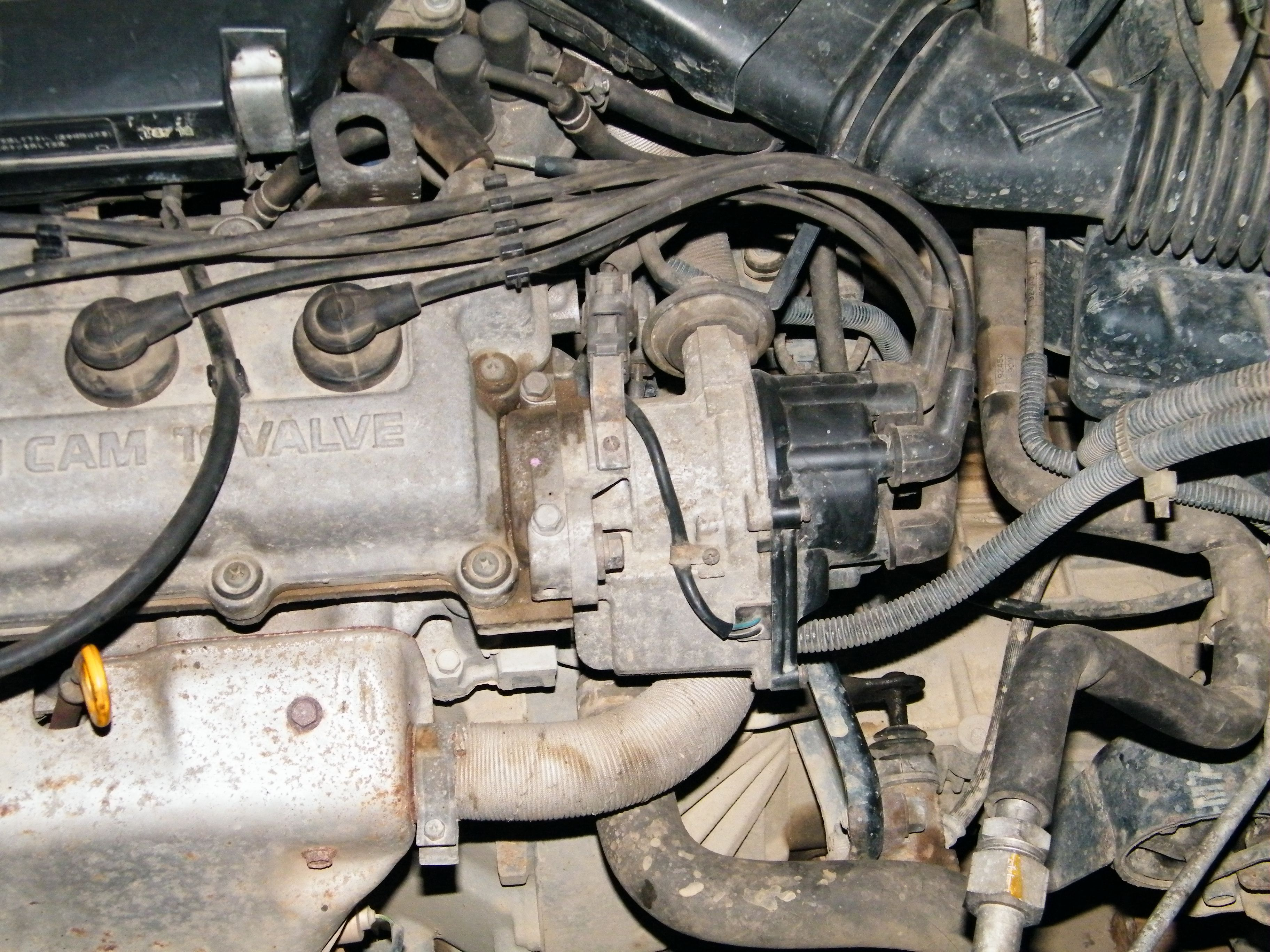 Распределитель зажигания, совмещен с катушкой зажигания